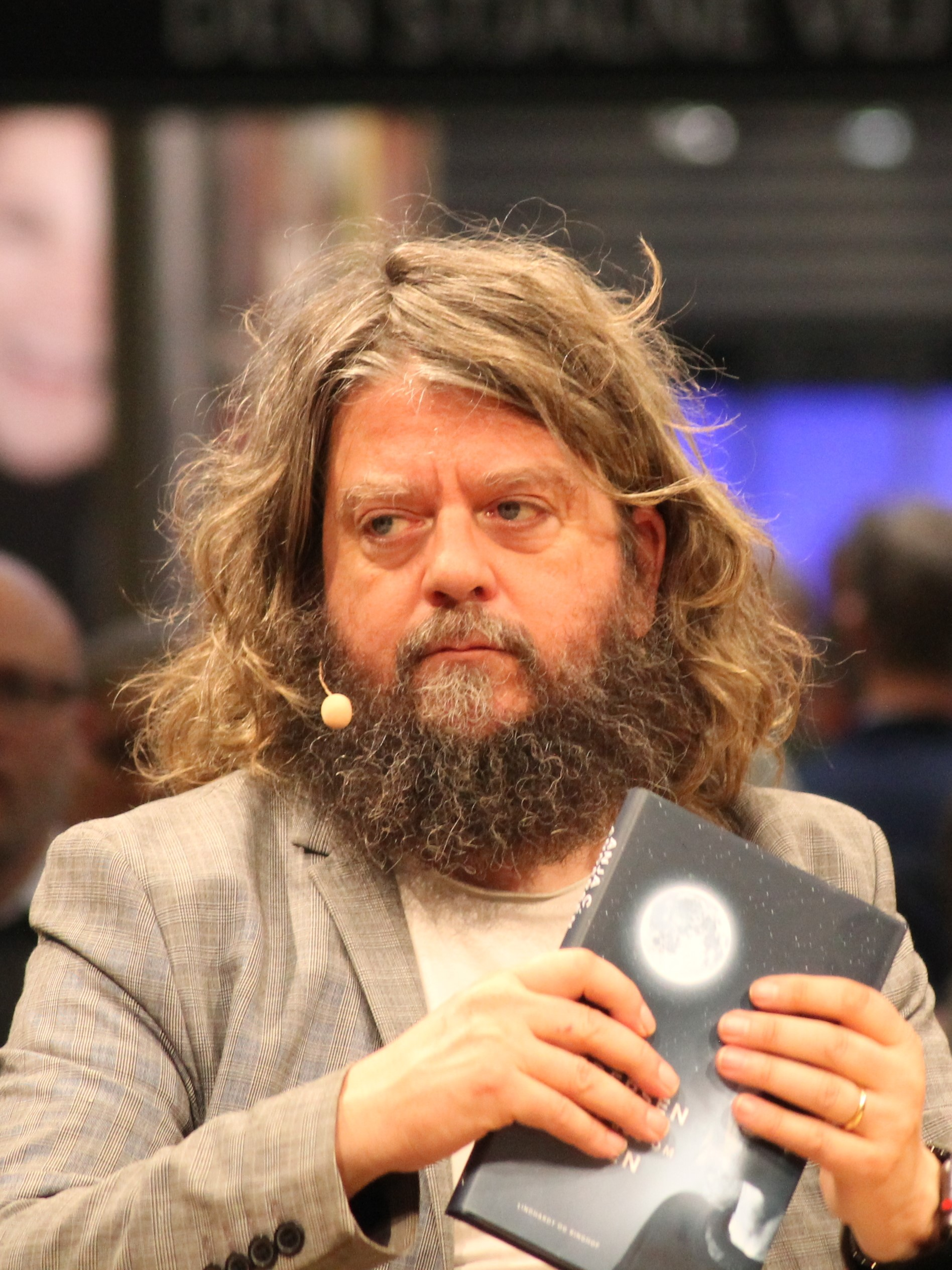 Anders Lund Madsen på Bogforum 2019.